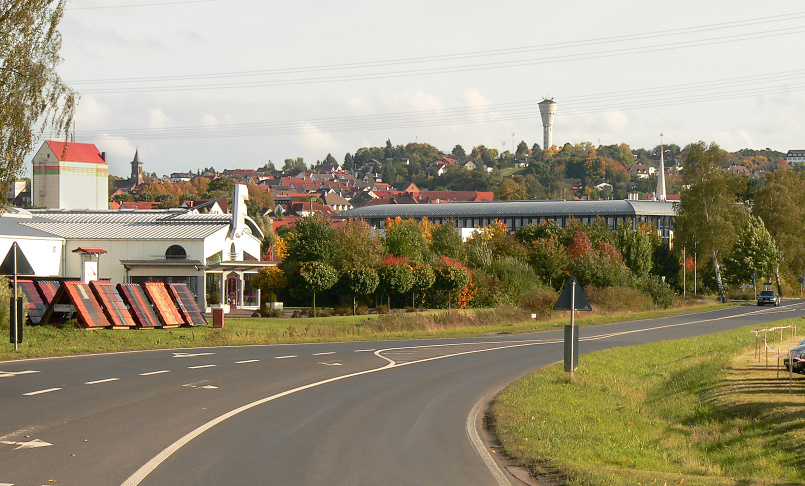 Straßeneinfahrt nach Borken